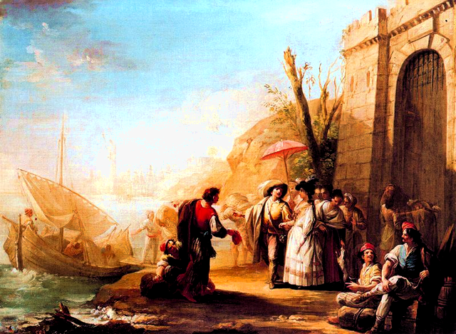 Marina